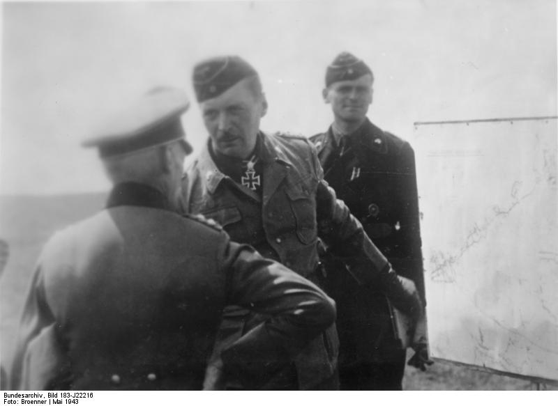 An der Sowjetfront: Oberst [Hyazinth] Graf von Strachwitz, Kommandeur des Panzerregiments "Großdeutschland" beim Vortrag [zu den Kämpfen um Borisowka, nordwestlich von Charkow] PK-Aufnahme: Kriegsberichter Broenner Mai 1943